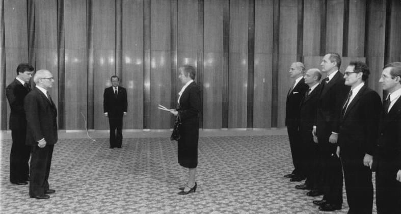 ADN-ZB Gahlbeck-26.1.83-pe-Berlin: Der Vorsitzende des Staatsrates und Generalsekretär des ZK der SED, Erich Honecker, empfing Rozanne L. Ridgway, Außerordentlicher und Bevollmächtigter Botschafter der Vereinigten Staaten von Amerika, zur Entgegennahme des Beglaubigungsschreibens.